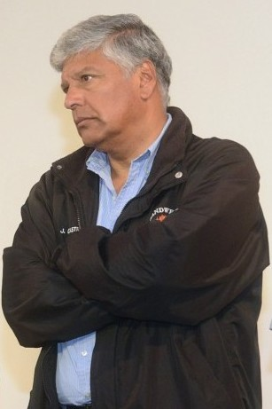 Jorge Castro